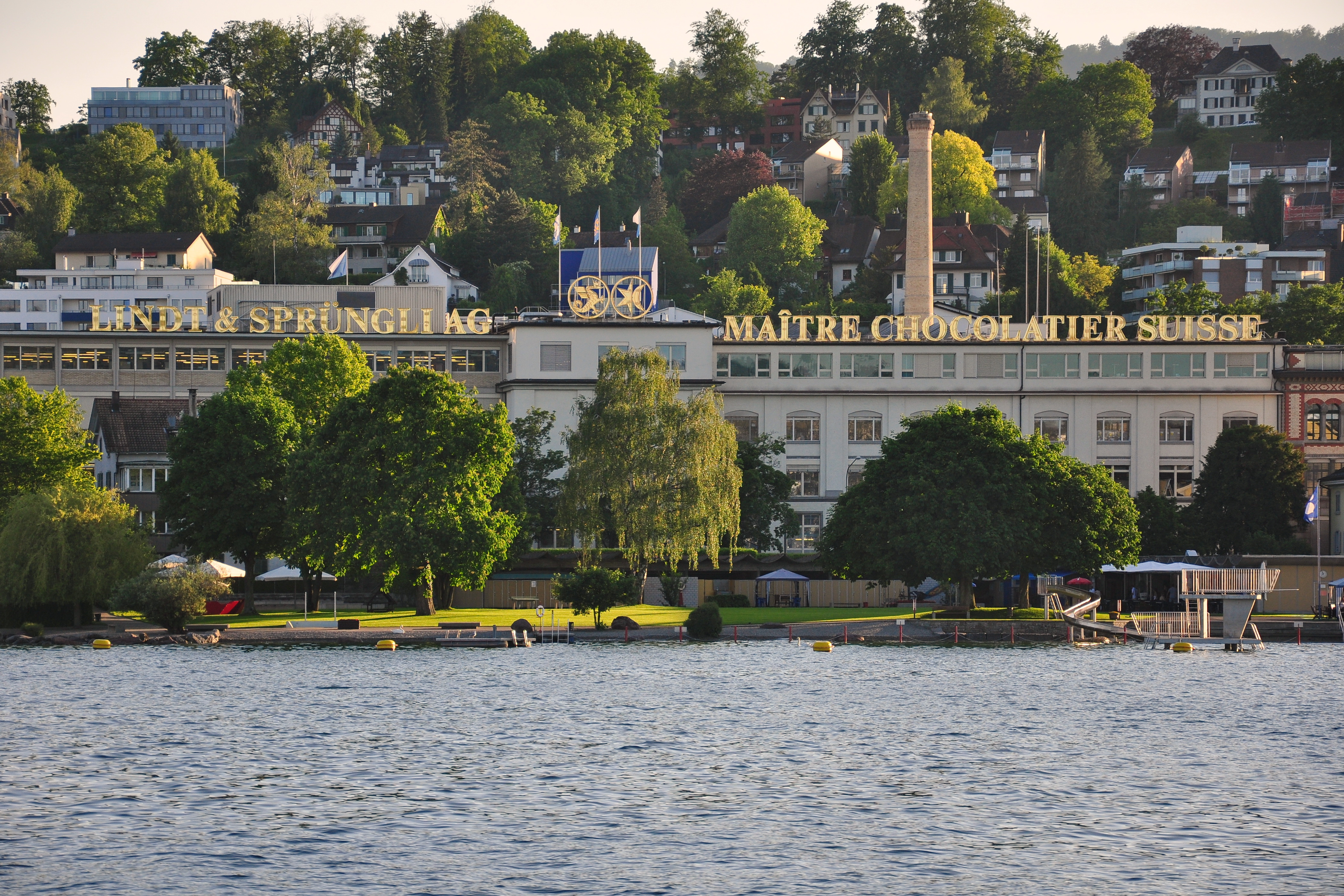 Lindt & Sprüngli Kilchberg (Switzerland) as seen from ZSG paddle steamship Stadt Zürich